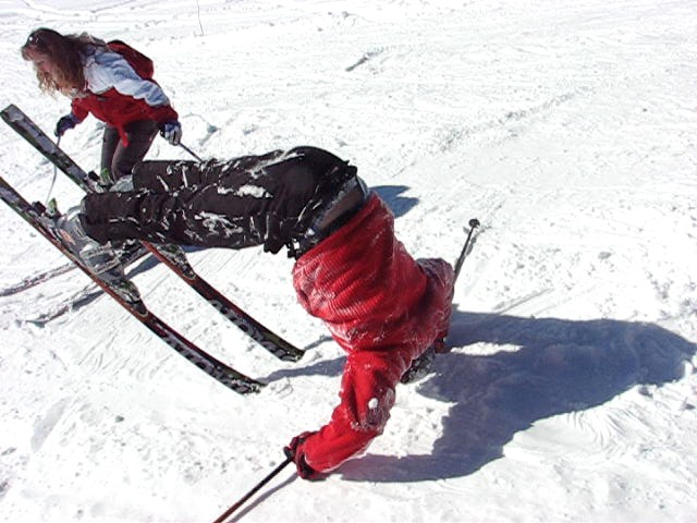 elastic ski